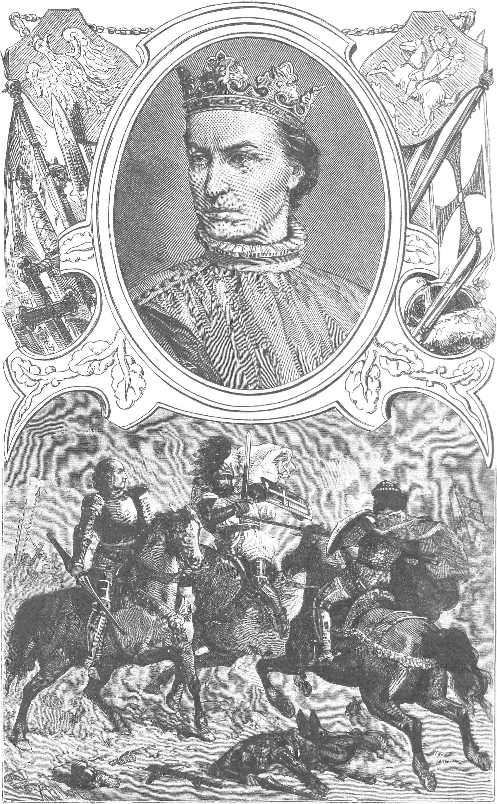 ilustracja z książki „Wizerunki książąt i królów polskich“